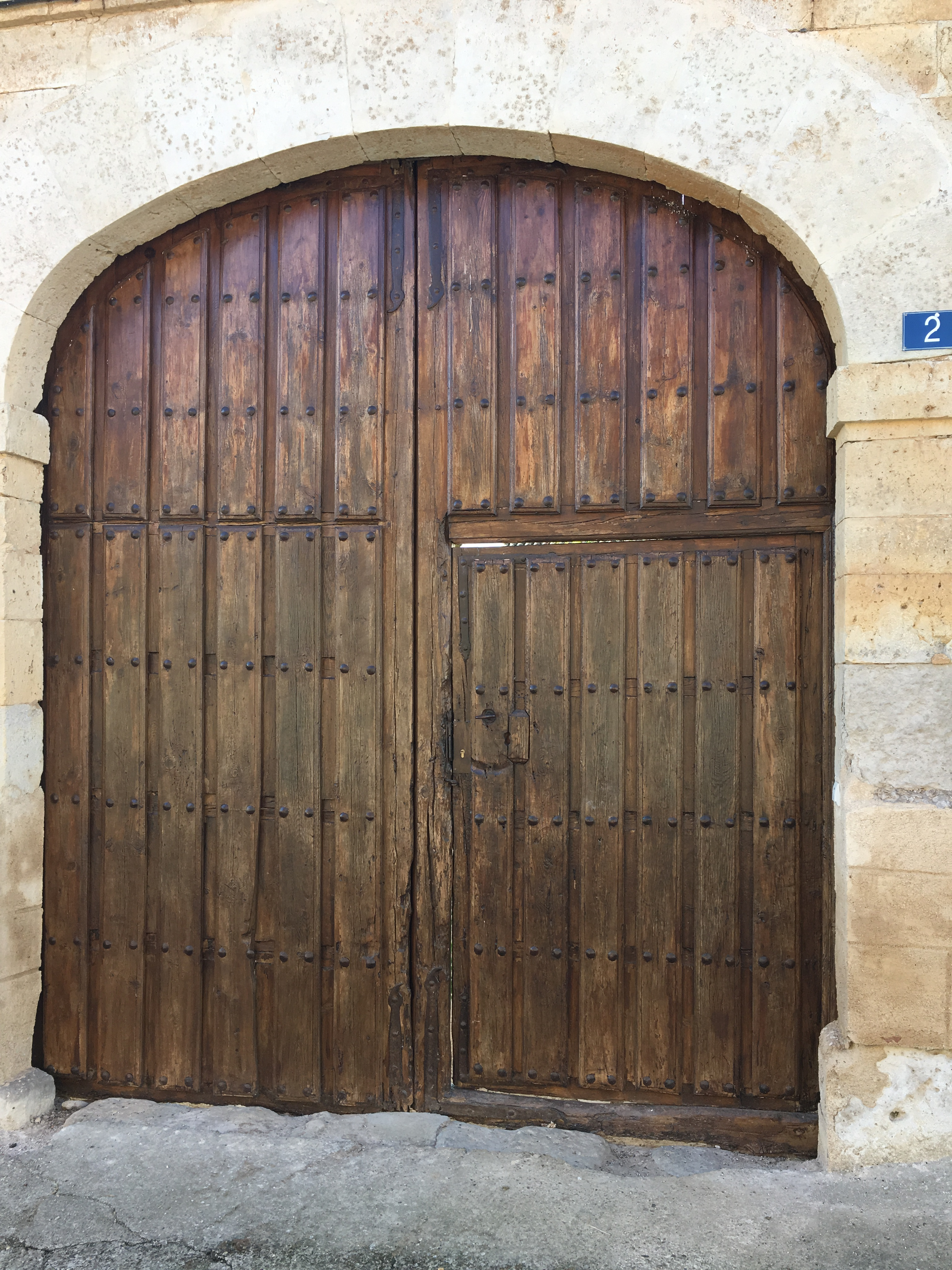 Villaesper Milenario